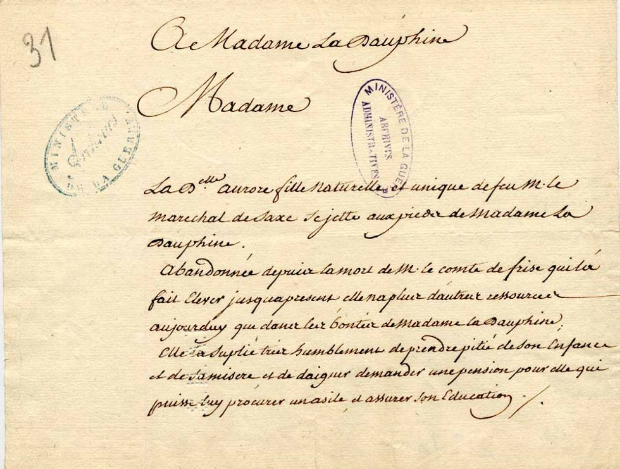 Supplique « Pour Mademoiselle Aurore (1748-1821), fille naturelle de Monsieur le Maréchal de Saxe (1696-1750), âgée de sept ans » à Madame la Dauphine. Marie-Aurore de Saxe est la grand-mère paternelle de George Sand.